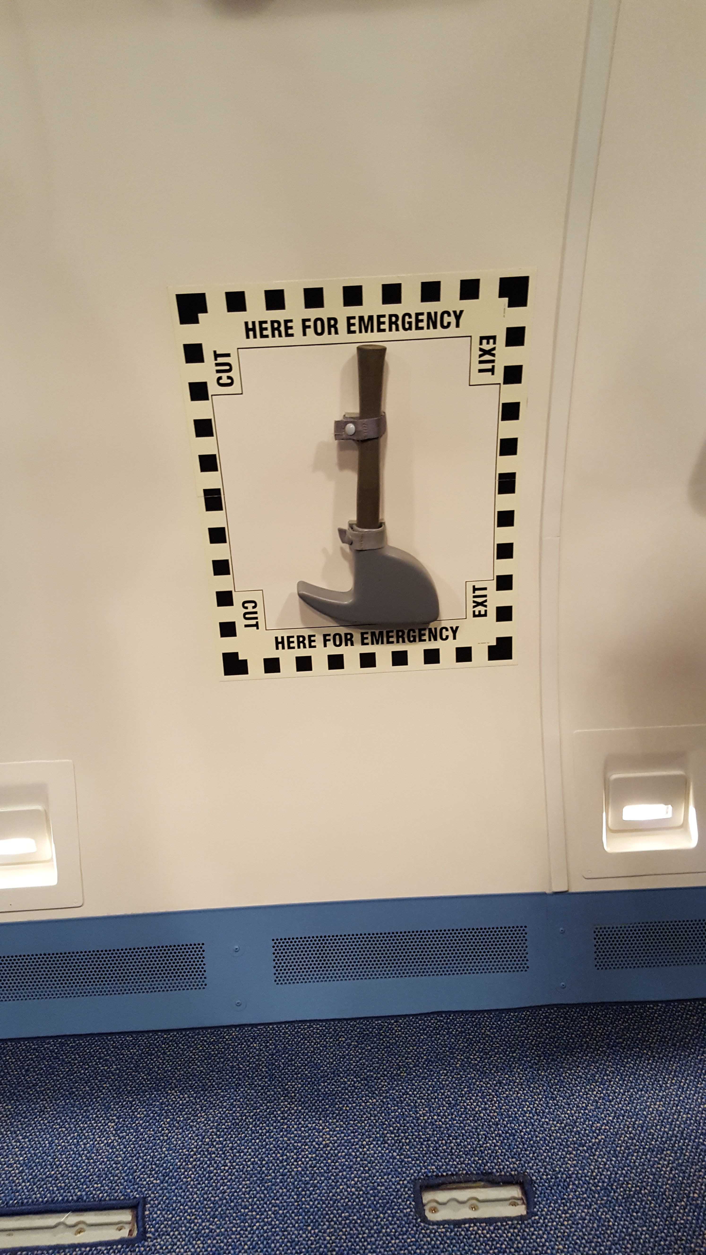 AWACS Boeing E-3 in Geilenkirchen. "Dosenöffner" für den Notfall